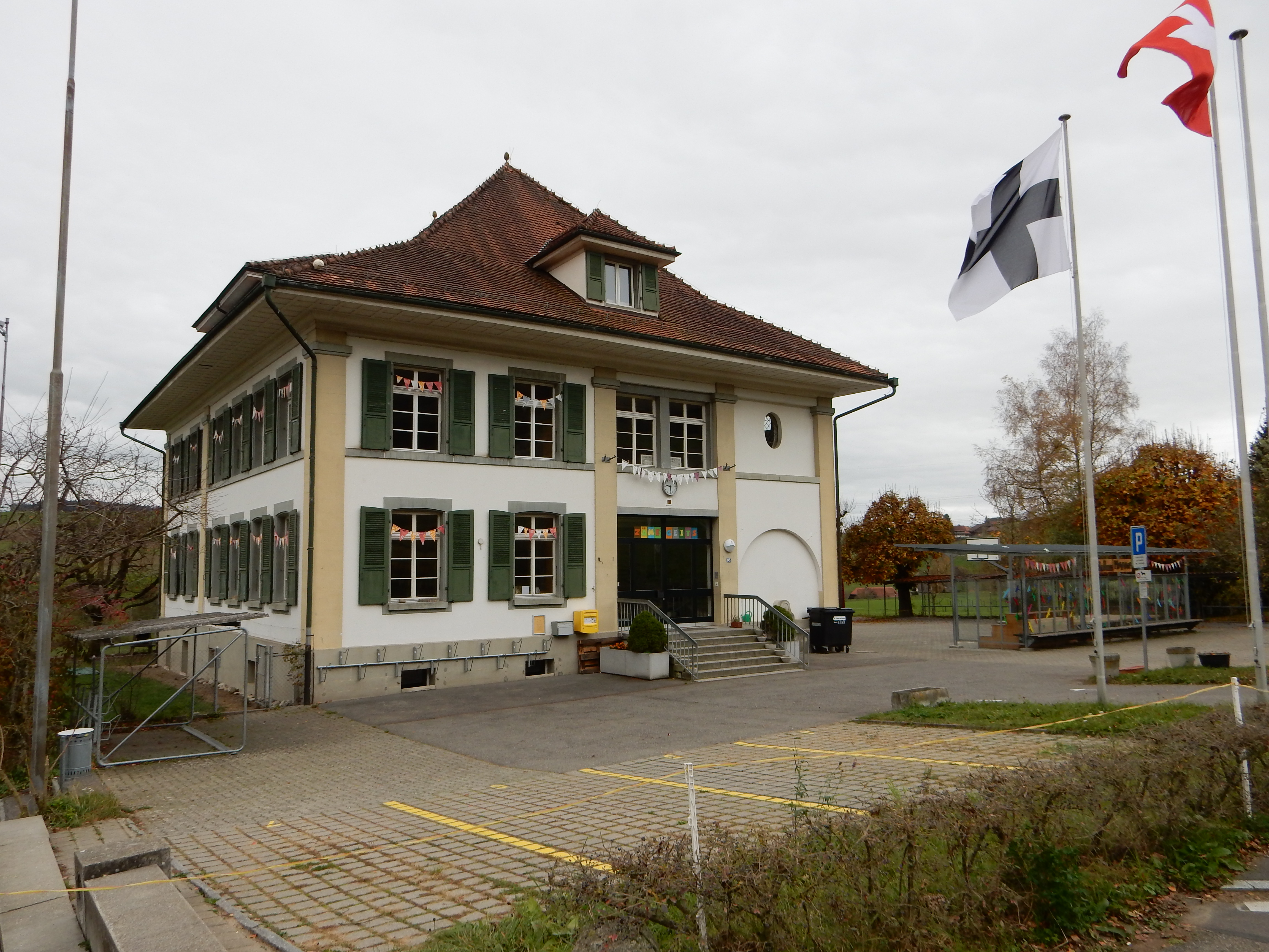 Schulhaus Mengestorf (Gemeinde Köniz / Schweiz)